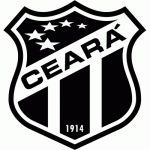 Logo: Ceará Sporting Club, Fortaleza (CE), Brazil.